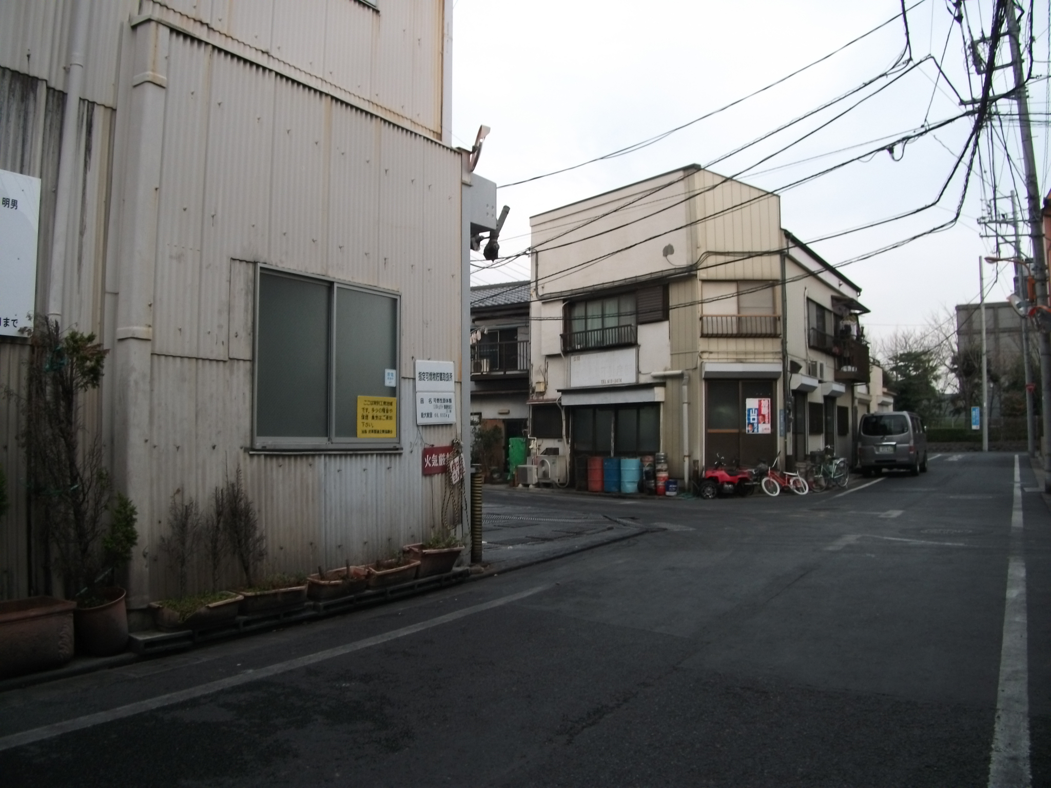 東京都墨田区、東墨田の街並み